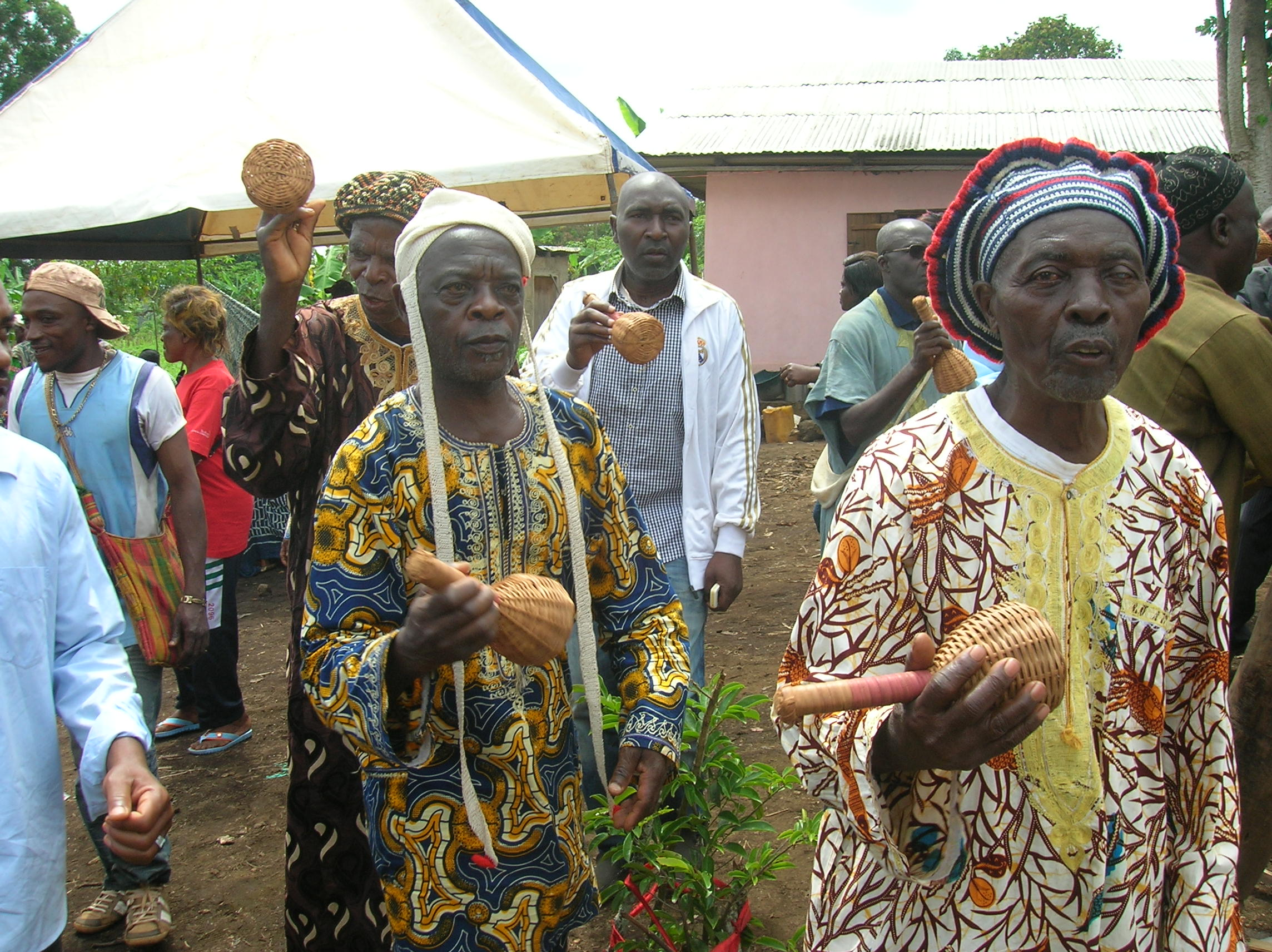 Pendant les funérailles en pays bamiléké This is an image of music and dance from Cameroon